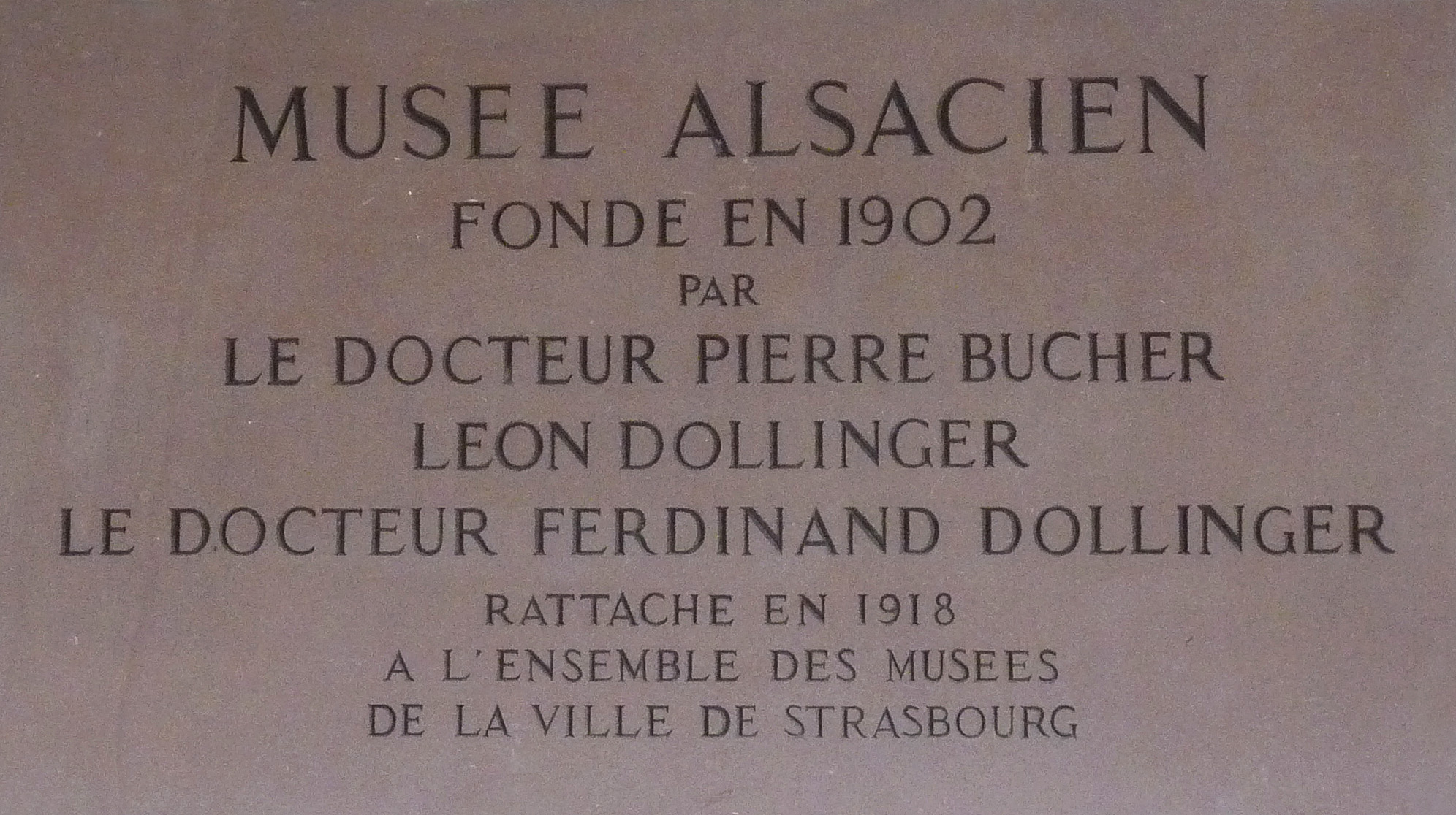 Plaque en hommage aux fondateurs du Musée alsacien de Strasbourg, Pierre Bucher, Léon Dollinger et son frère Ferdinand Dollinger.